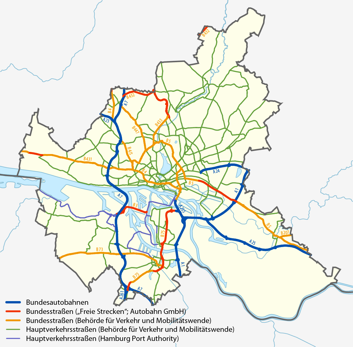 Hauptstraßennetz Hamburg